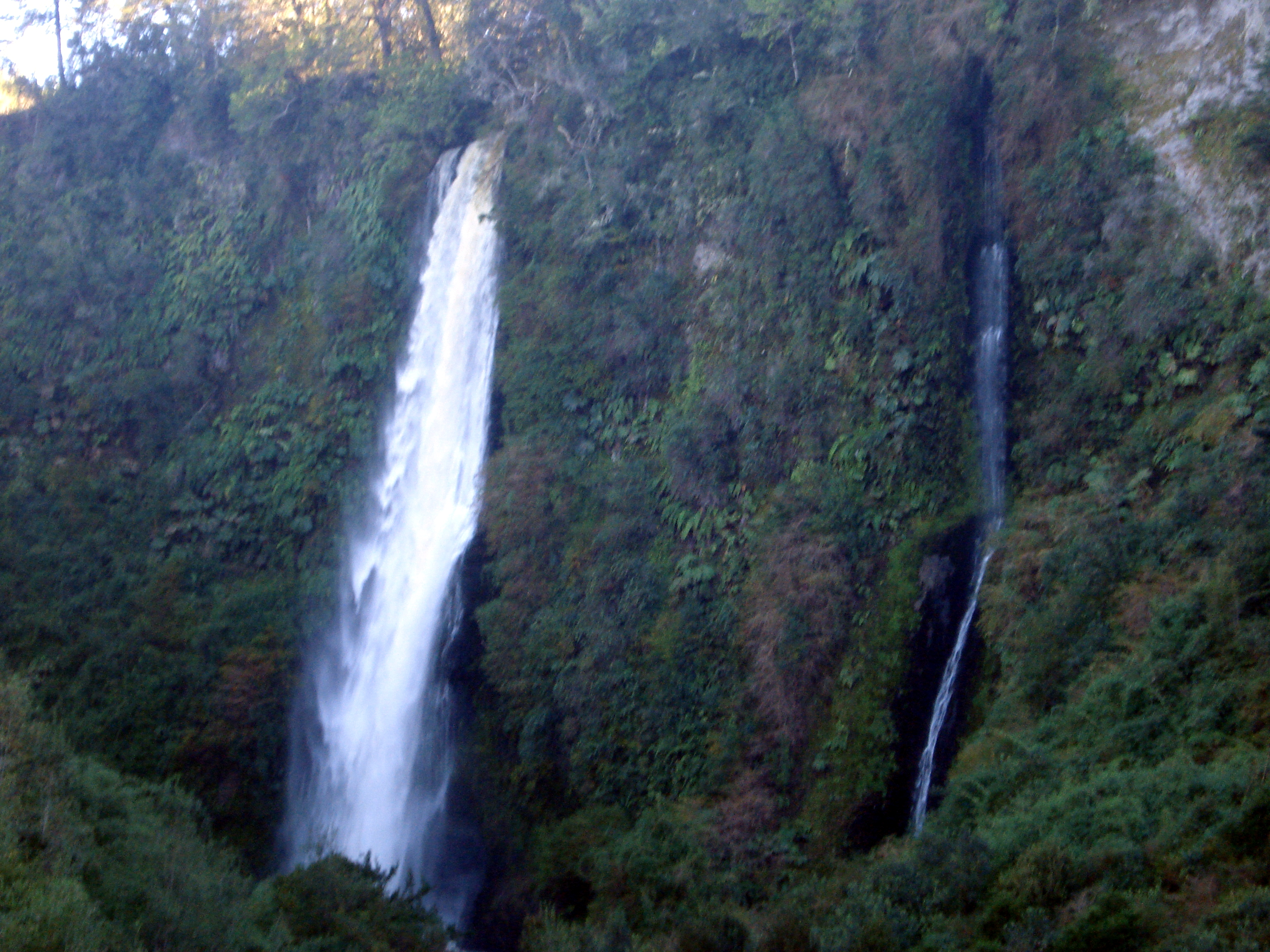 Cascadas de Tocoihue, de aprox. 60 m de altura, en la comuna de Dalcahue, isla de Chiloé, Chile.